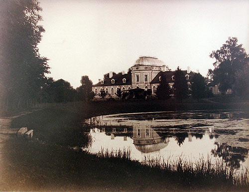 Беларуская (тарашкевіца): Шчорсы (Ščorsy), сядзіба Храптовічаў (Chraptovič)